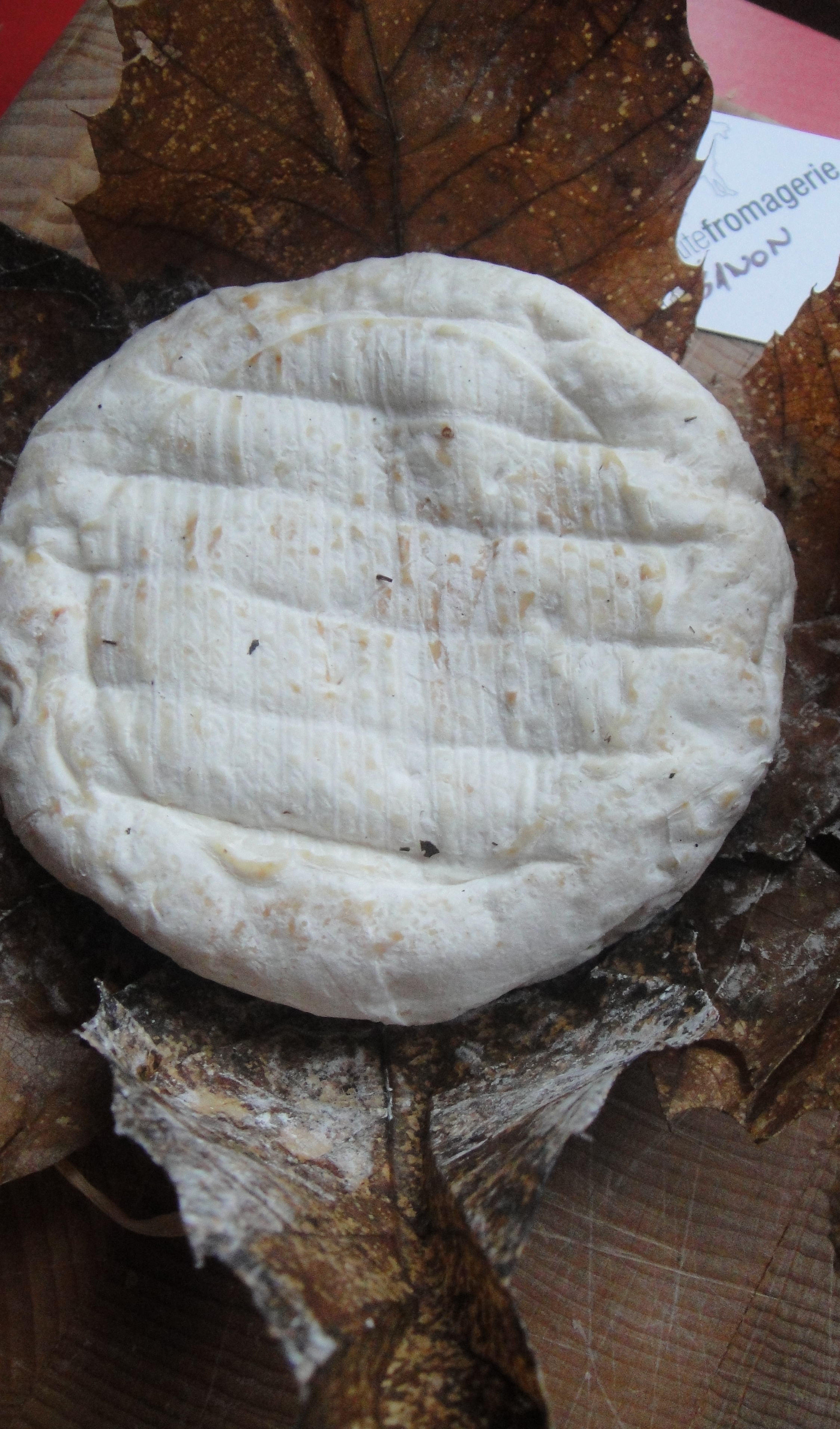 Banon plié dans sa feuille de châtaignier